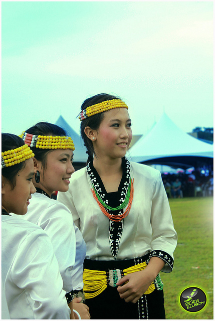 lundayeh